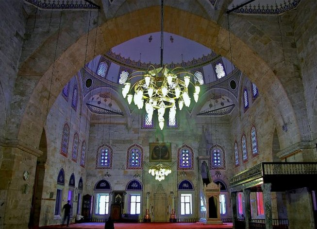 Amasya II.Beyazid camii